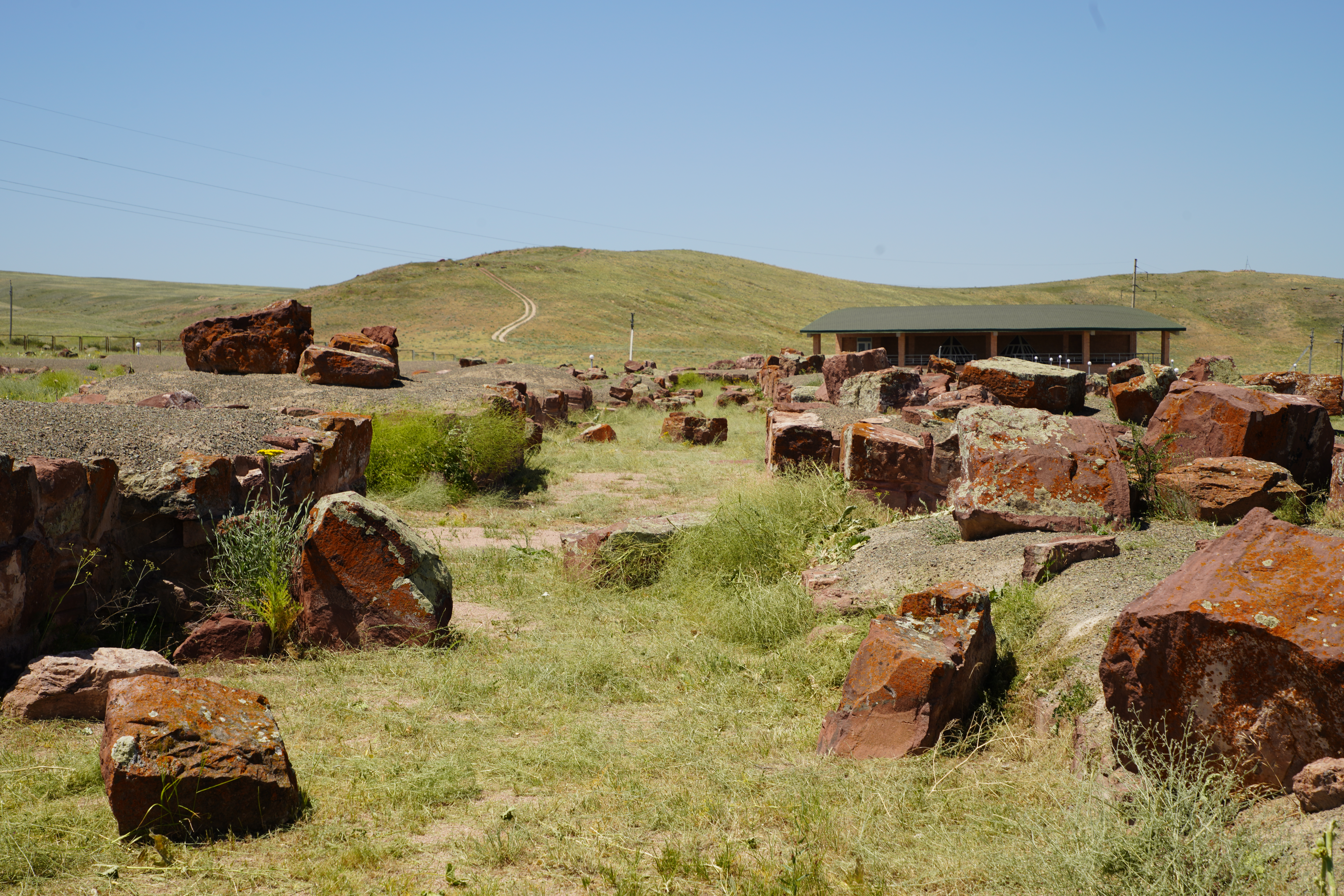 Акыртас